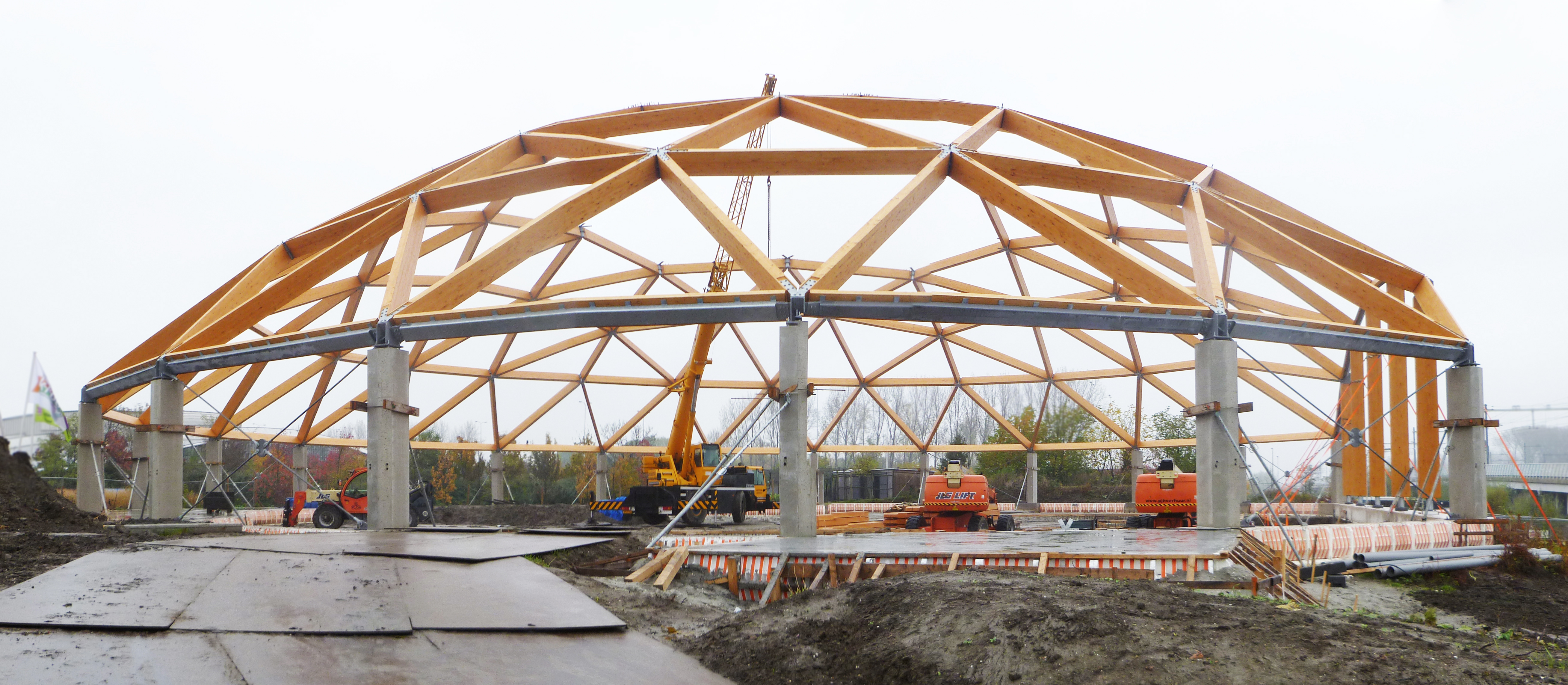 De bouw van Amazonica Dome. Een tropische biotoop onder een houten geodetische koepel voor Diergaarde Blijdorp Rotterdam.